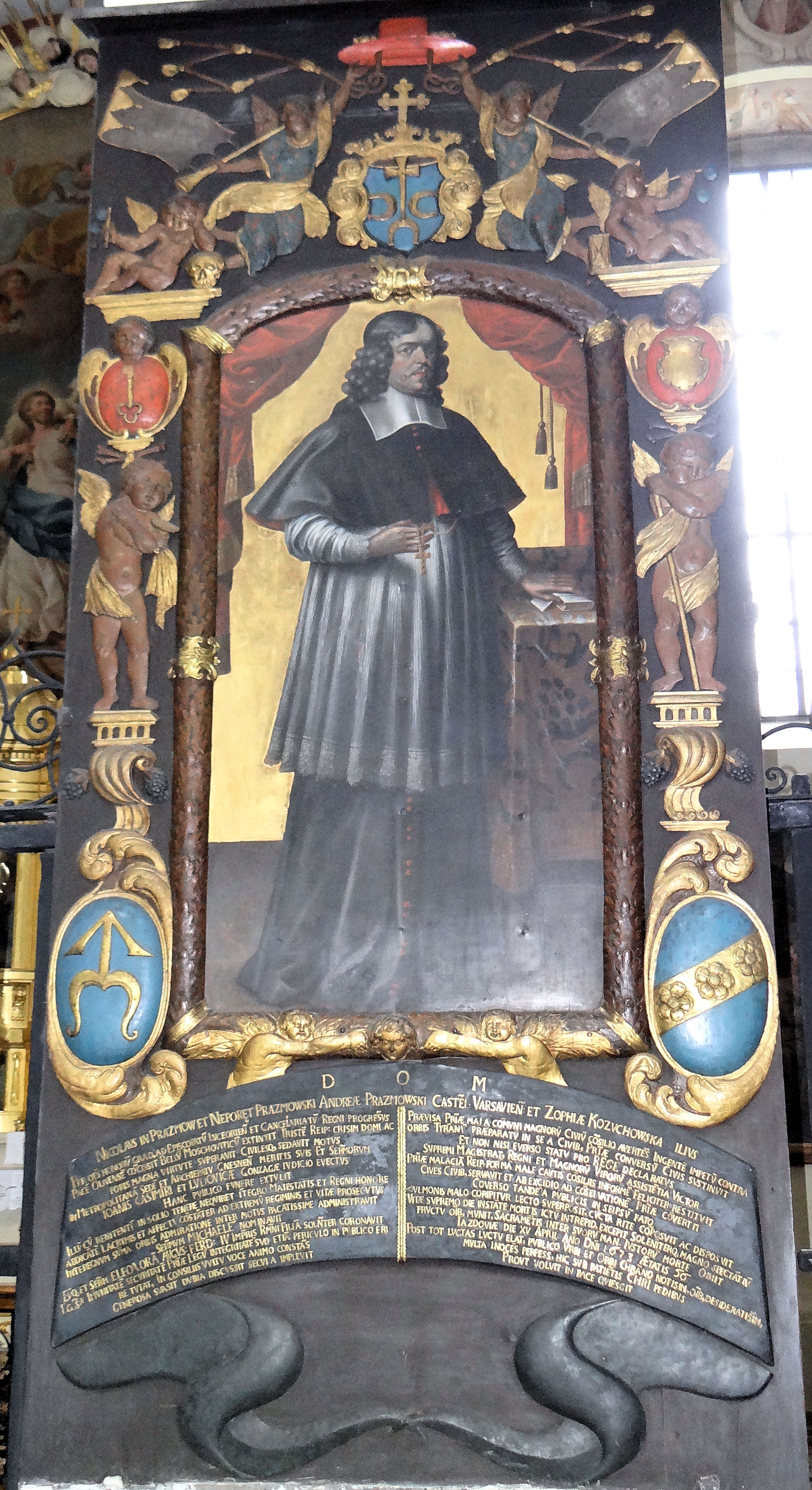 Bazylika Katedralna w Łowiczu - epitafium arcybiskupa Mikołaja Prażmowskiego